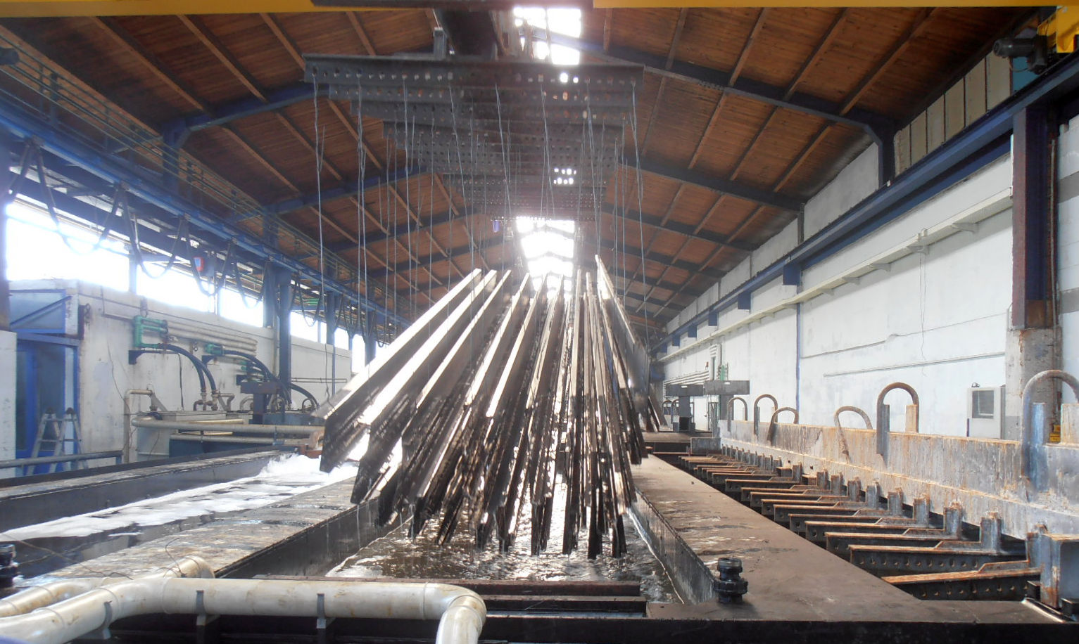 Feuerverzinken: Werkstücke werden aus dem 1. Spülbad gehoben